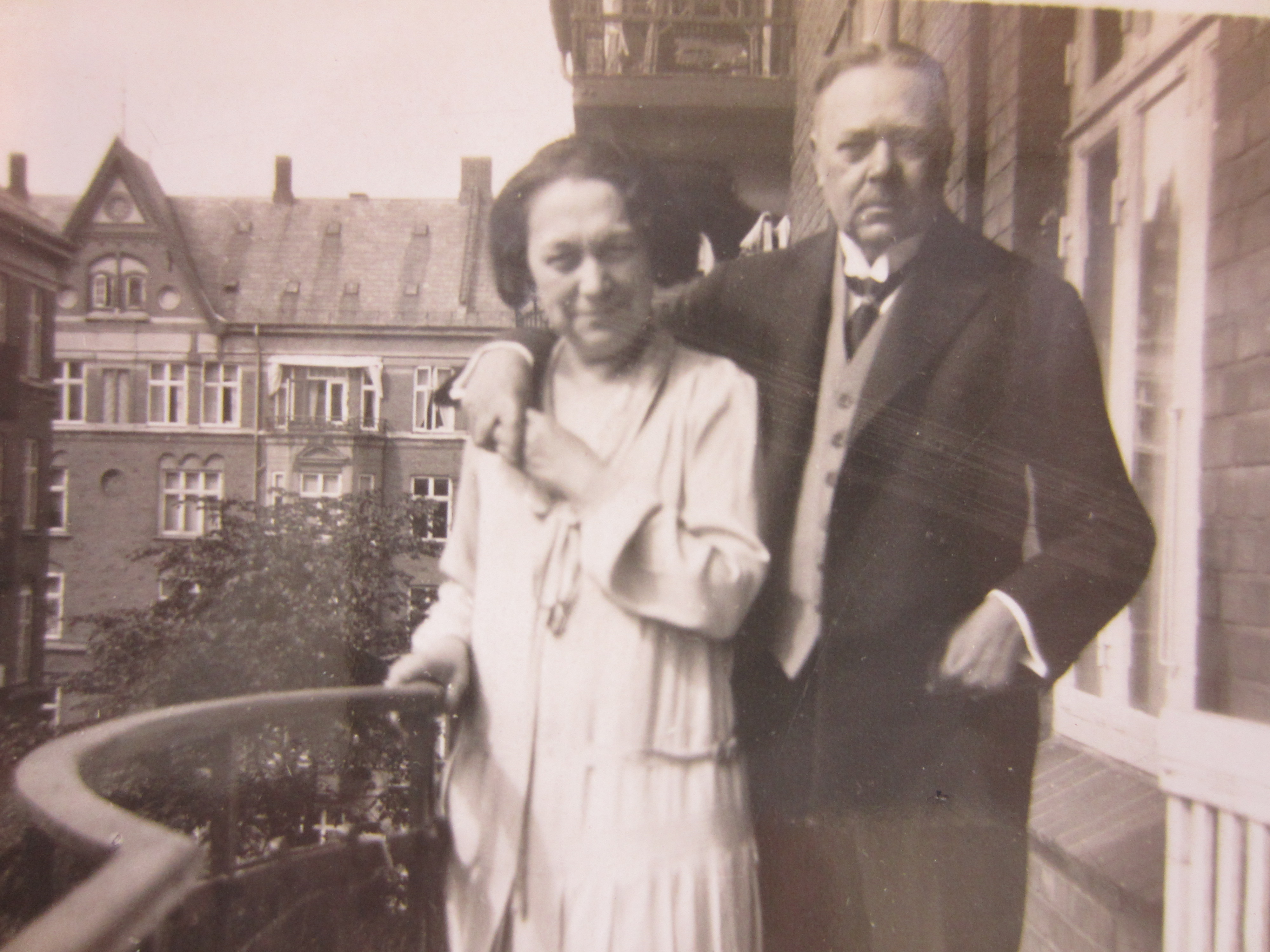 Emelie och Hjalmar Söderberg på balkongen till deras bostad på Allégade i Frederiksberg, omkring år 1930. Orginalfotot finns i Göteborgs universitetsbibliotek.